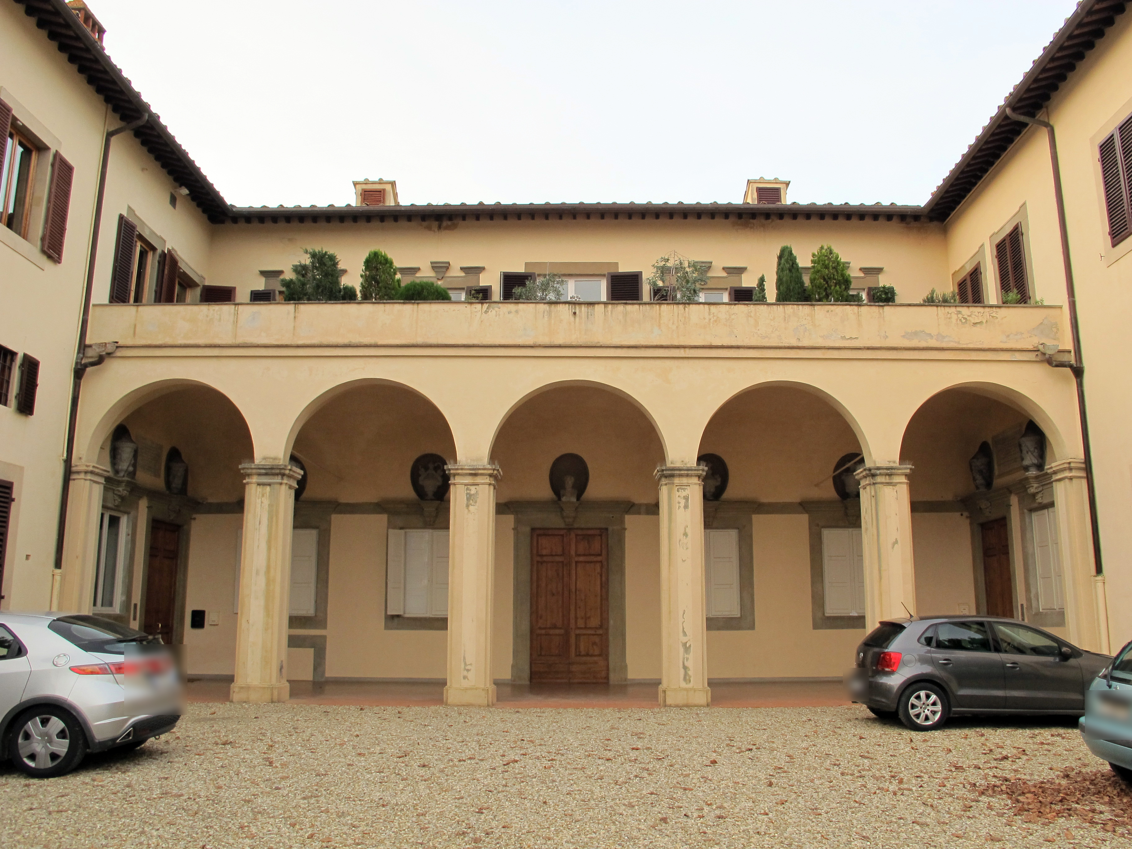 Villa di Lappeggi